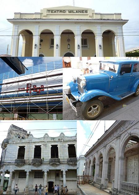 Collage sobre Pinar del Río